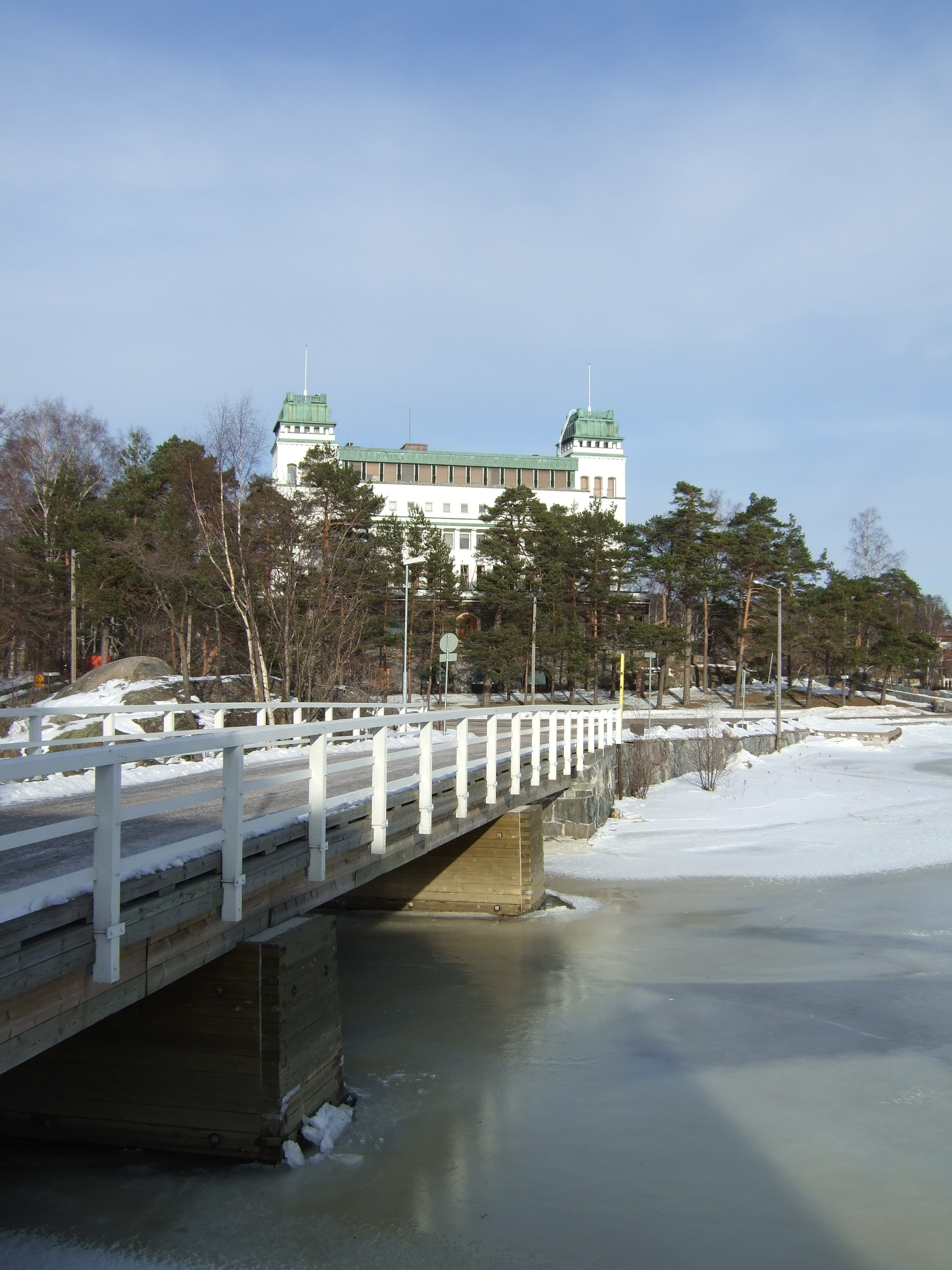 Wihuri Building in Kulosaari.